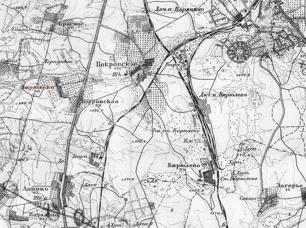 Бирюлёво, Аннино, Покровское на карте Москвы и окрестностей 1930 года.